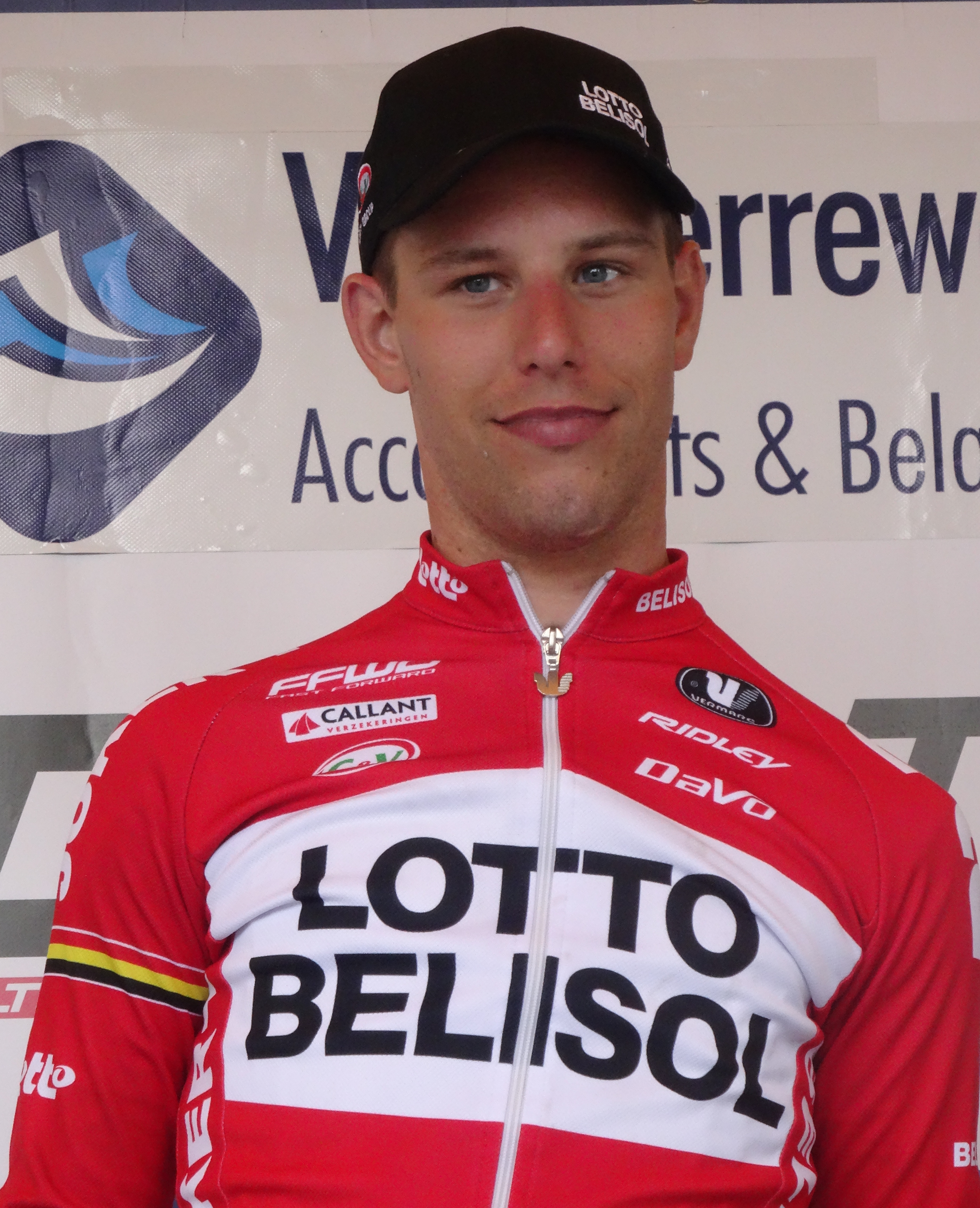 Reportage photographique réalisé le samedi 5 juillet à l'occasion du départ et de l'arrivée du Circuit Het Nieuwsblad espoirs 2014 à Grotenberge (Zottegem), Belgique.